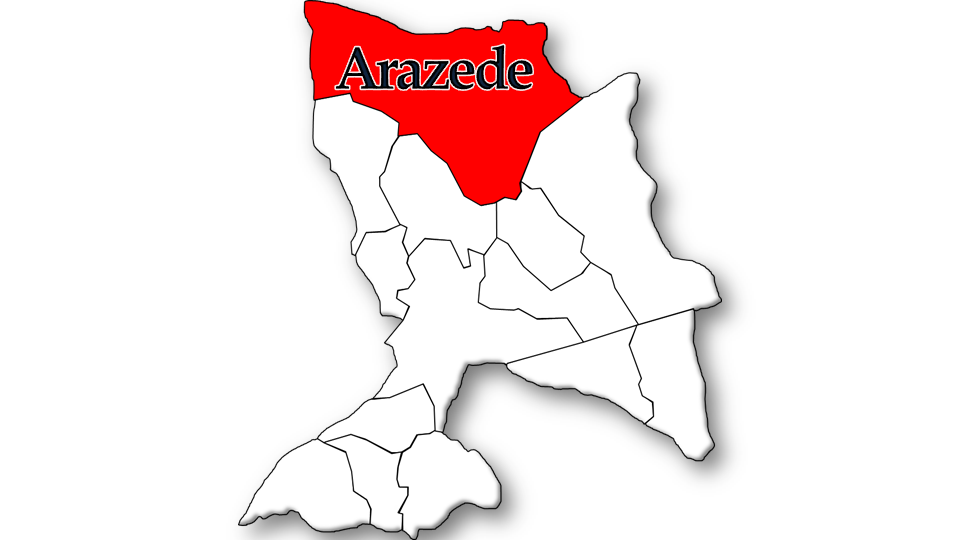 População